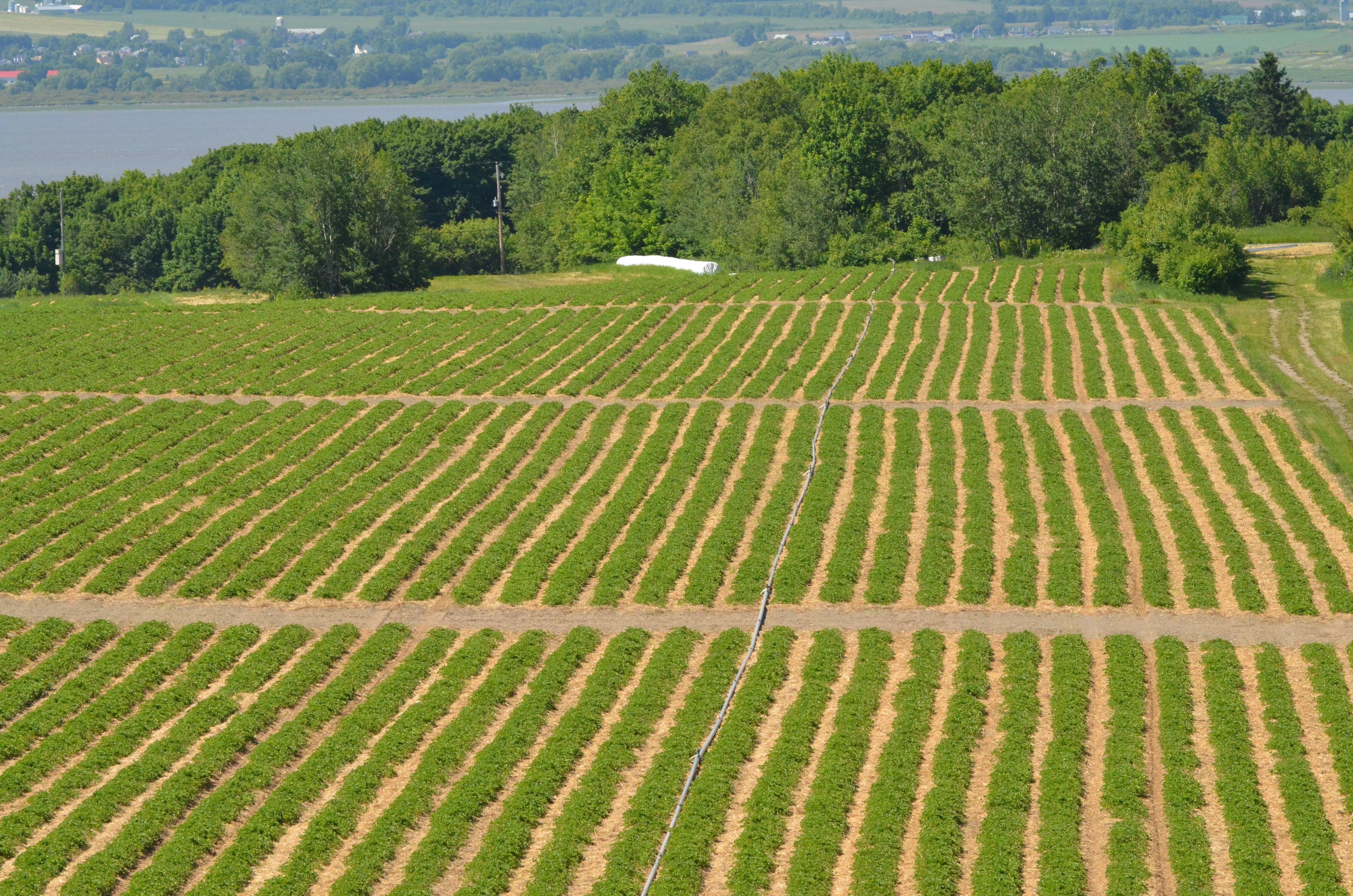 Image de la ville de Québec provenant du concours Wikipédia prend Québec.